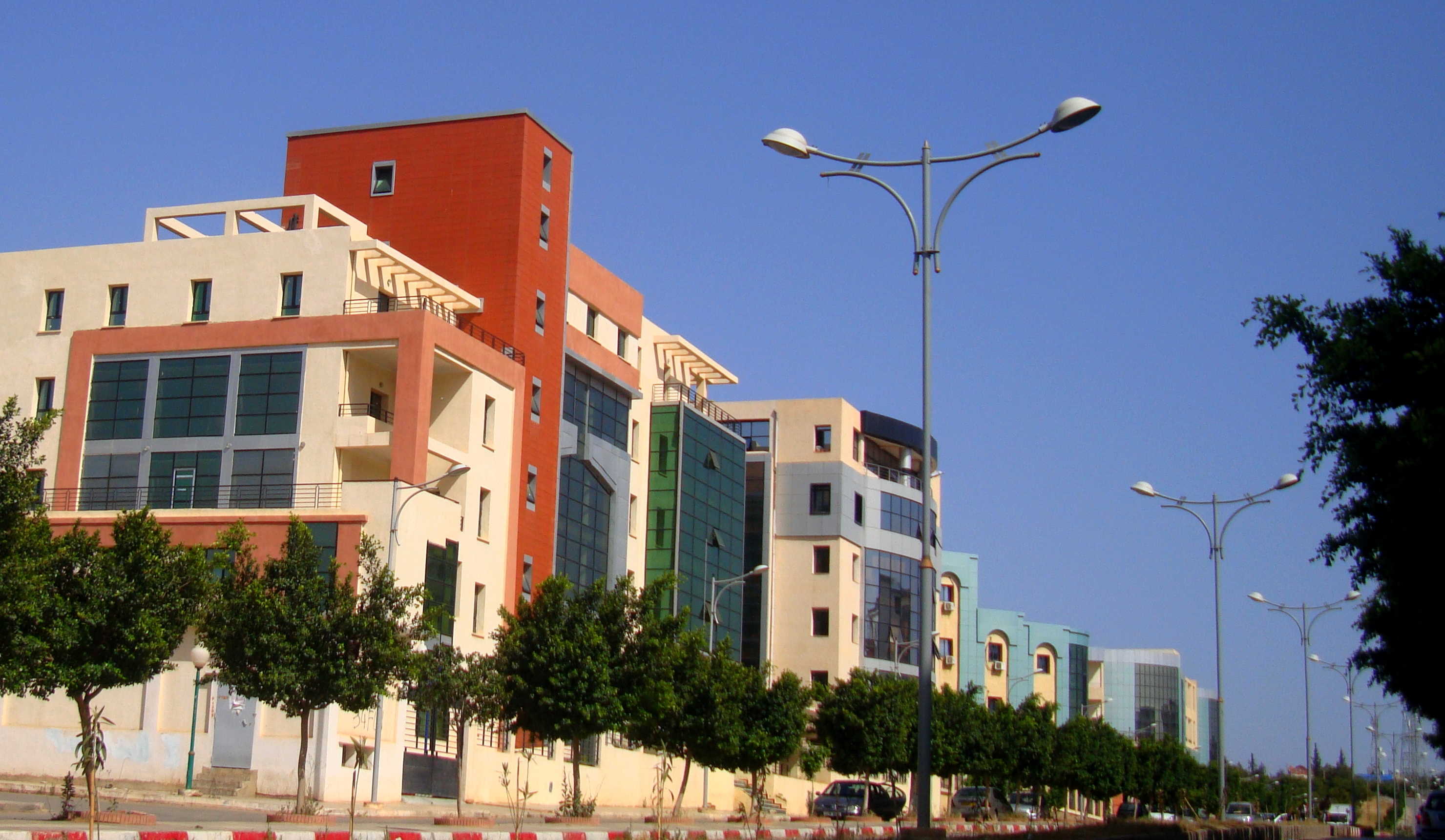 Quartier administratif Hay Nasr (Direction des travaux publiques, Algérienne des eaux et la maison de la culture)